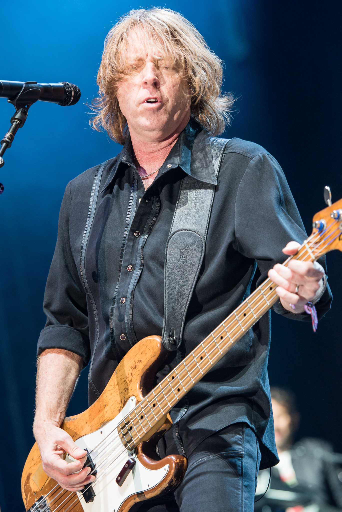 Brombachsee,Concertbüro Franken,Festival,Foreigner,Jeff Pilson,Konzert,Lieder am See,Livekonzert,Livemusik,Musik